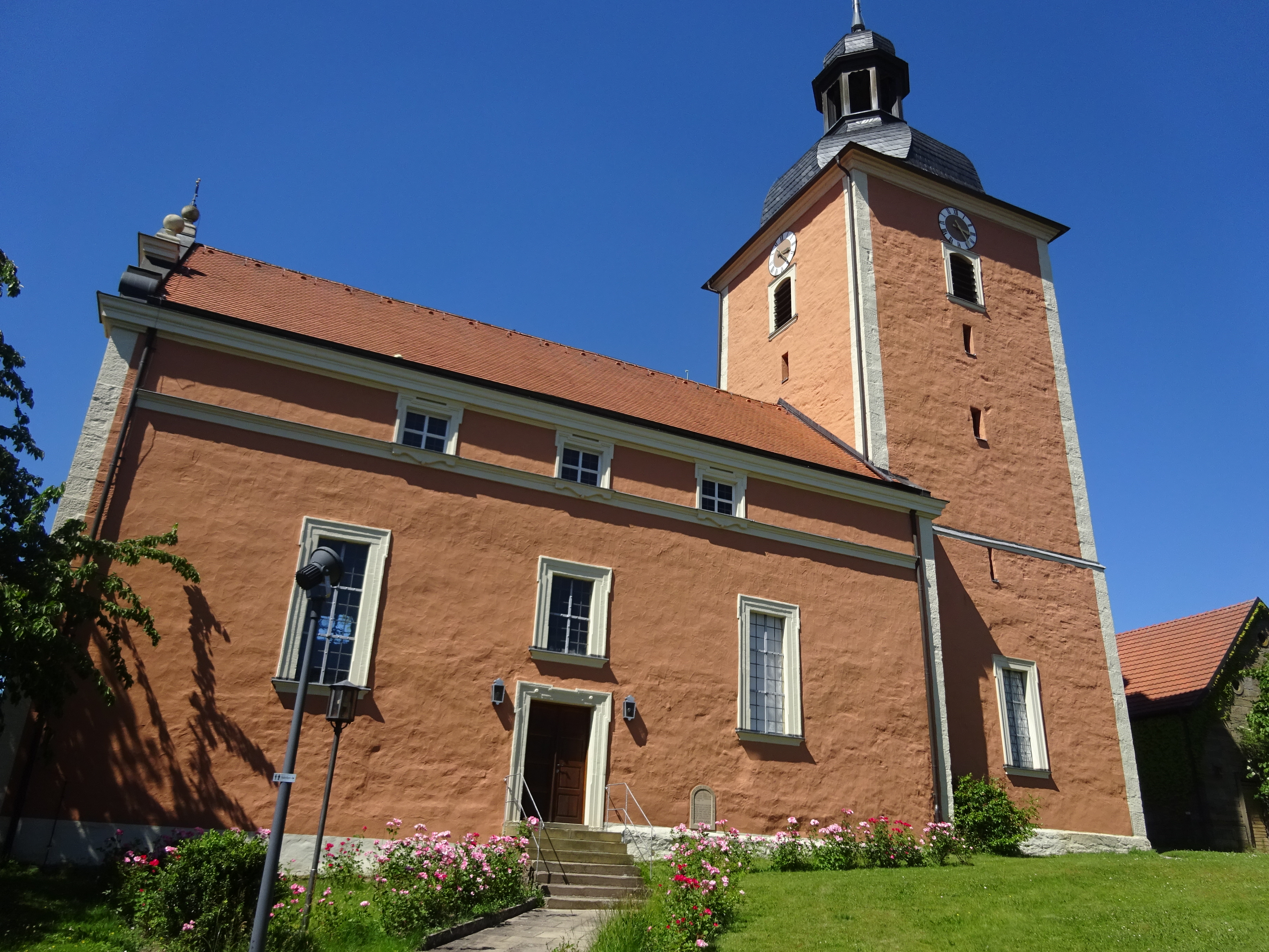 Heilig-Geist-Kirche